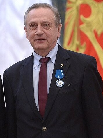 Вручение государственных наград Российской Федерации. Президент Общероссийской общественной организации «Федерация фигурного катания на коньках России» Александр Горшков награждён орденом Почёта.